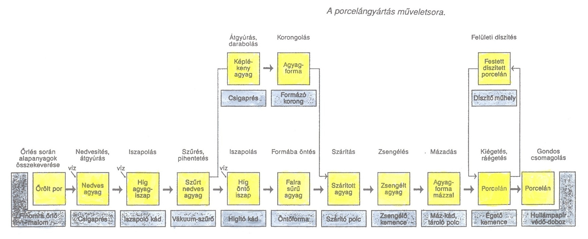 A porcelángyártás technológiai műveleti lépései